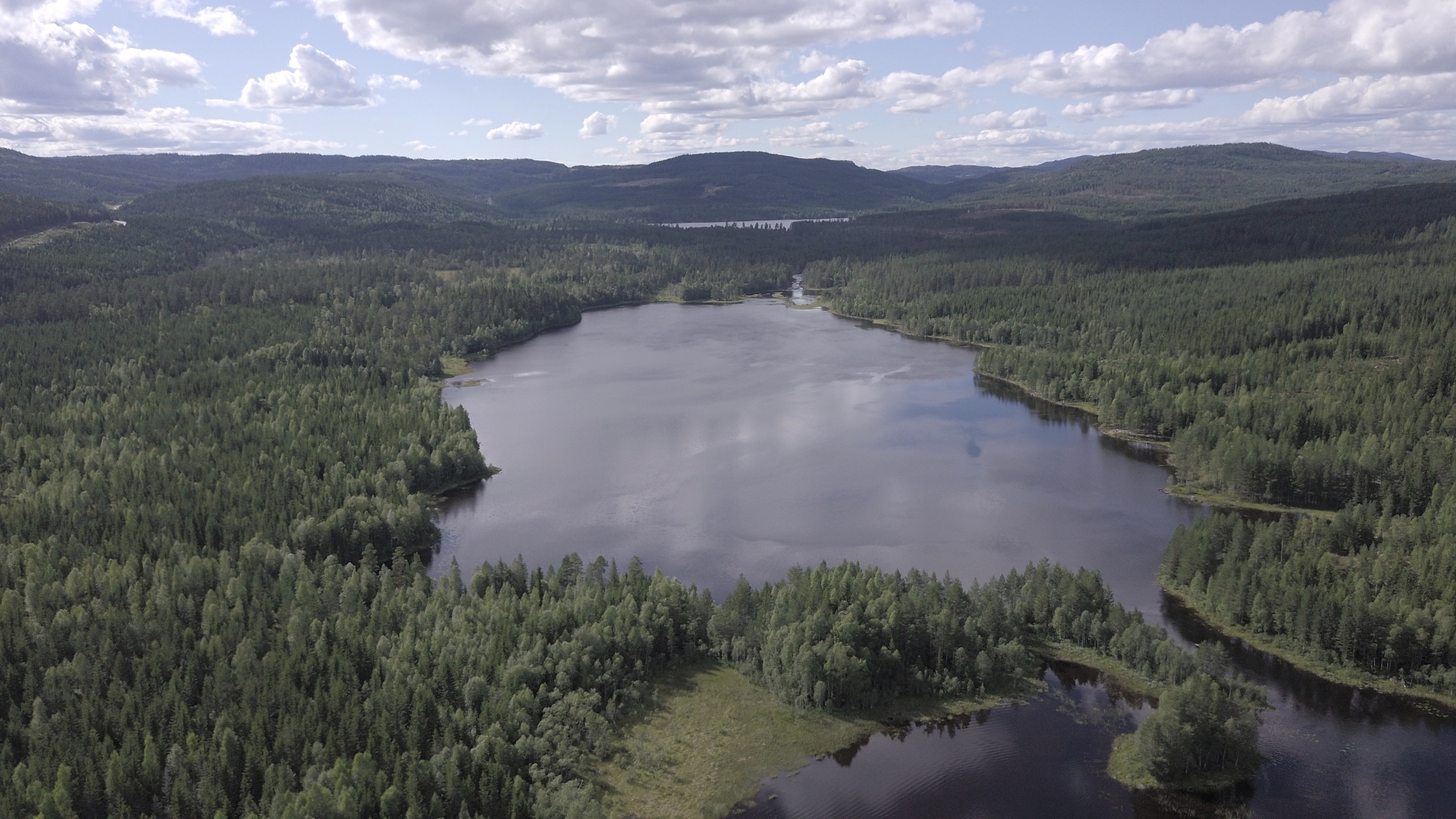 Leirsjøen i Roa